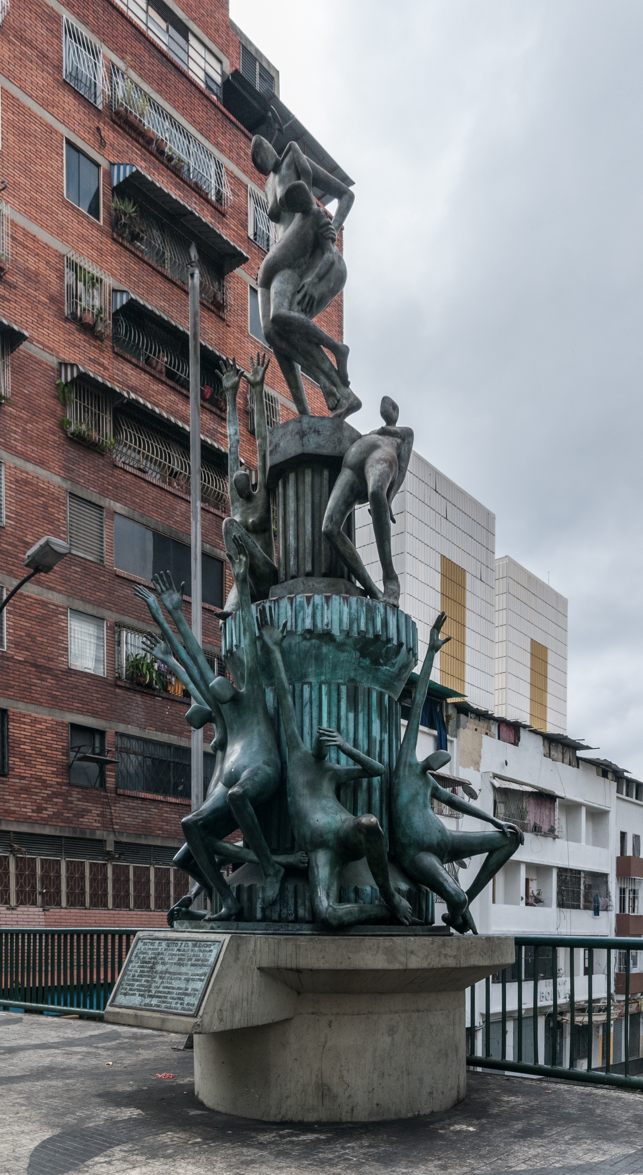 Monumento a los caídos en Puente Llaguno.